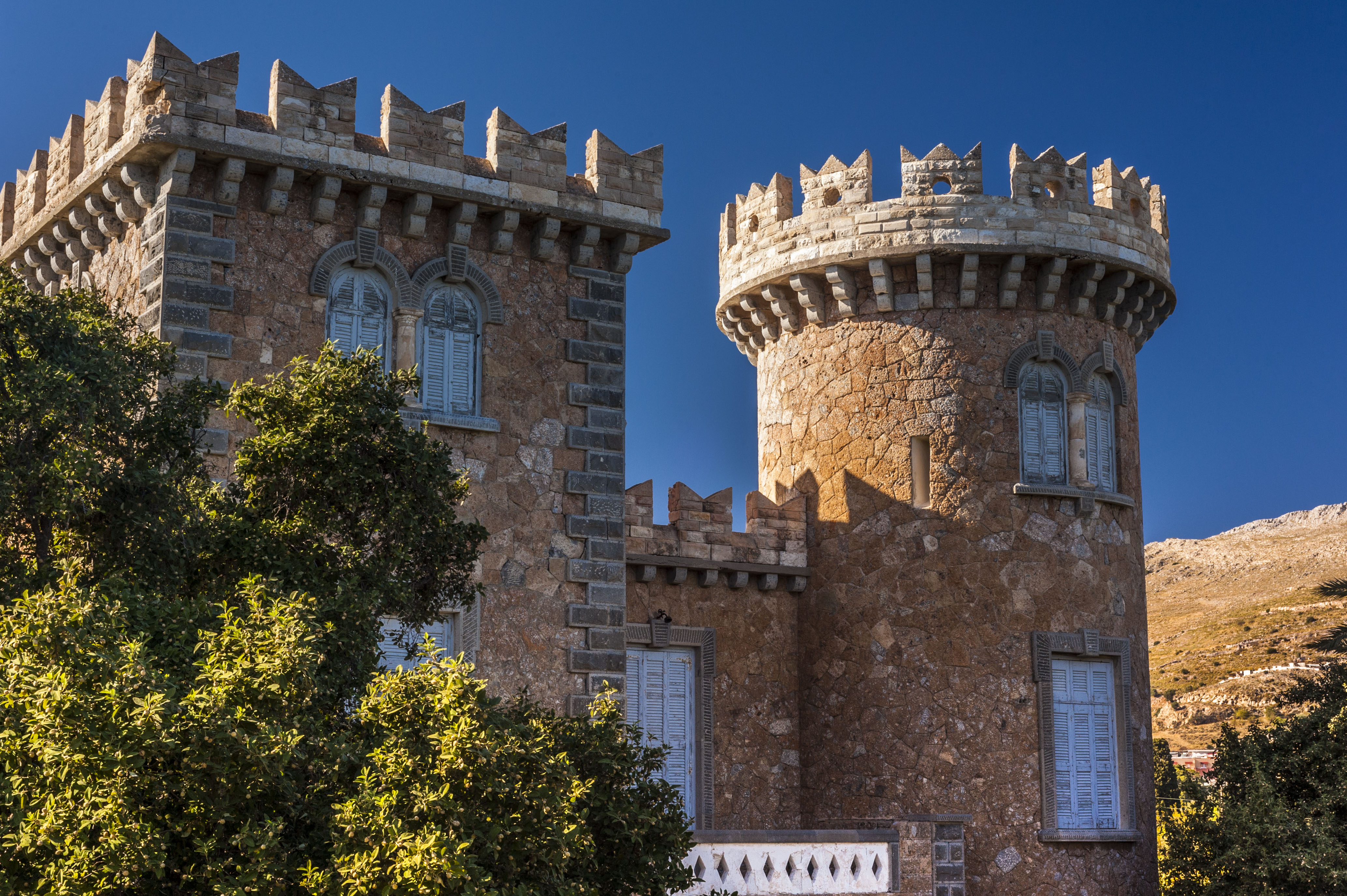 Bellenis Tower, Leros Hellas